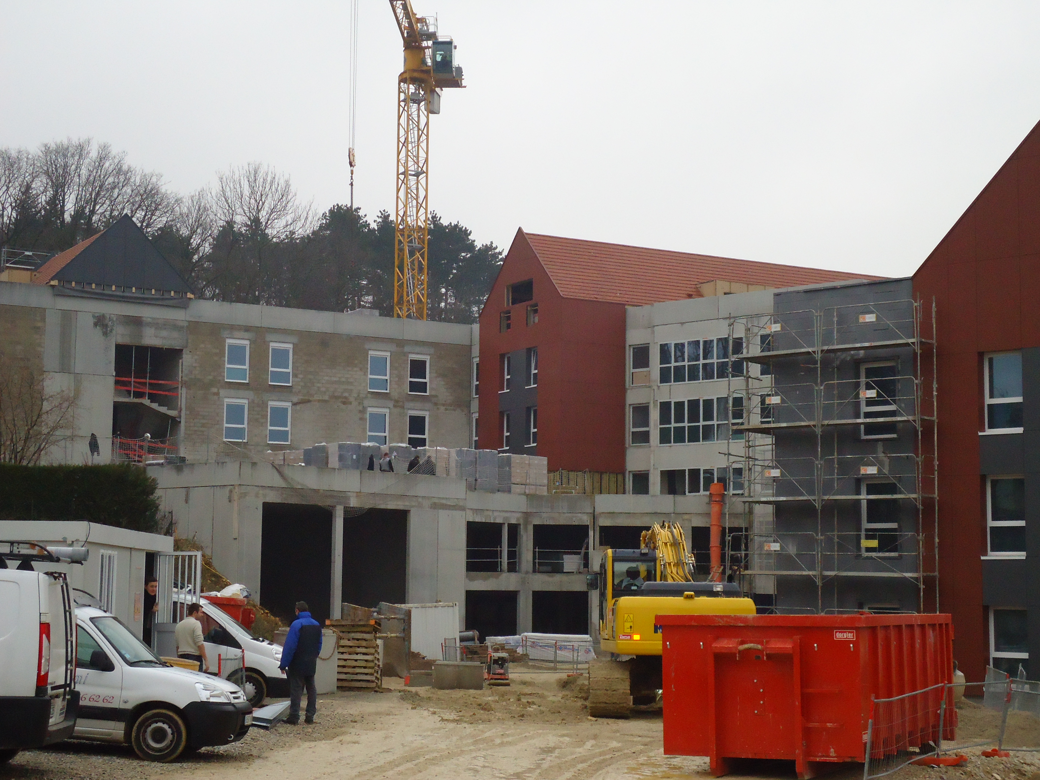 Travaux à la Maison Blanche à Beaucourt (90)